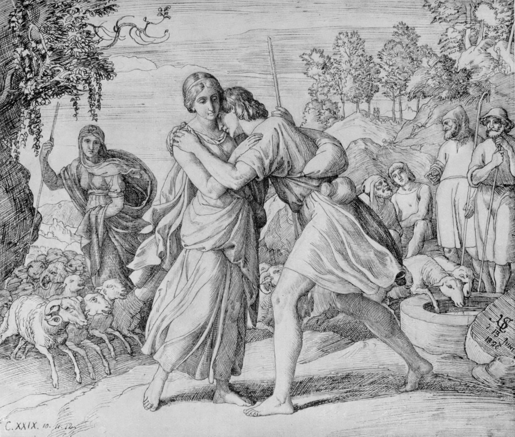 Jakob und Rahel am Brunnen aus der Bibel in Bildern. Federzeichnung